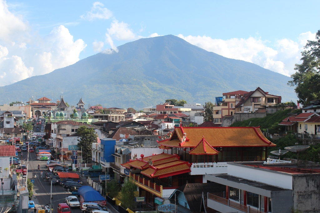 Landscape dari atas jembatan Limpapeh